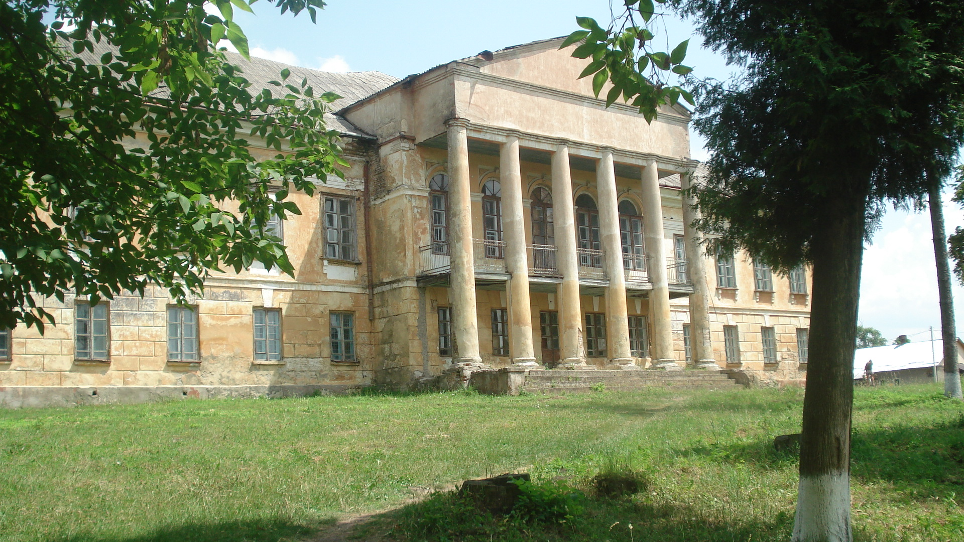 Палац маєтку Стецьких